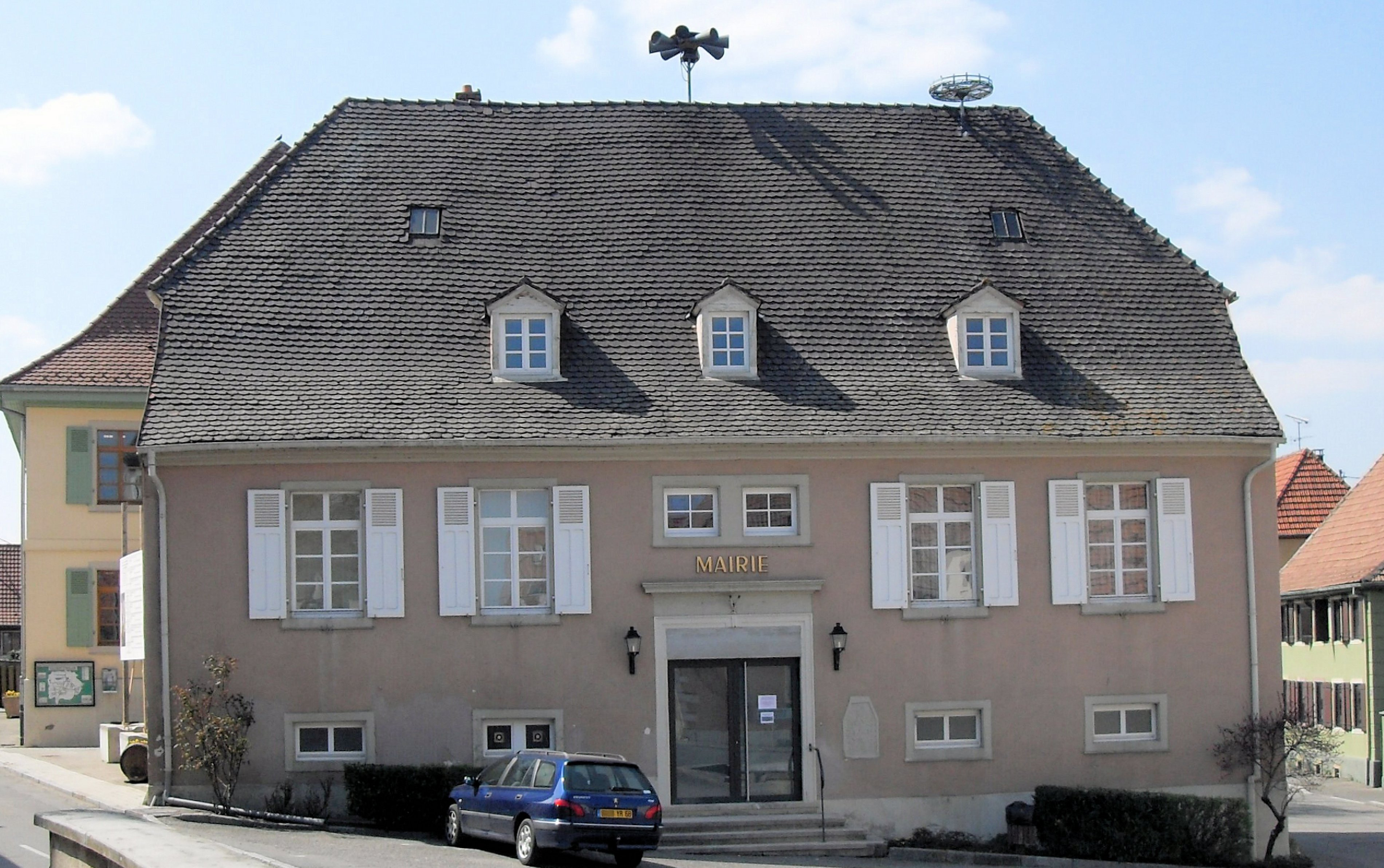 La mairie de Eschentzwiller